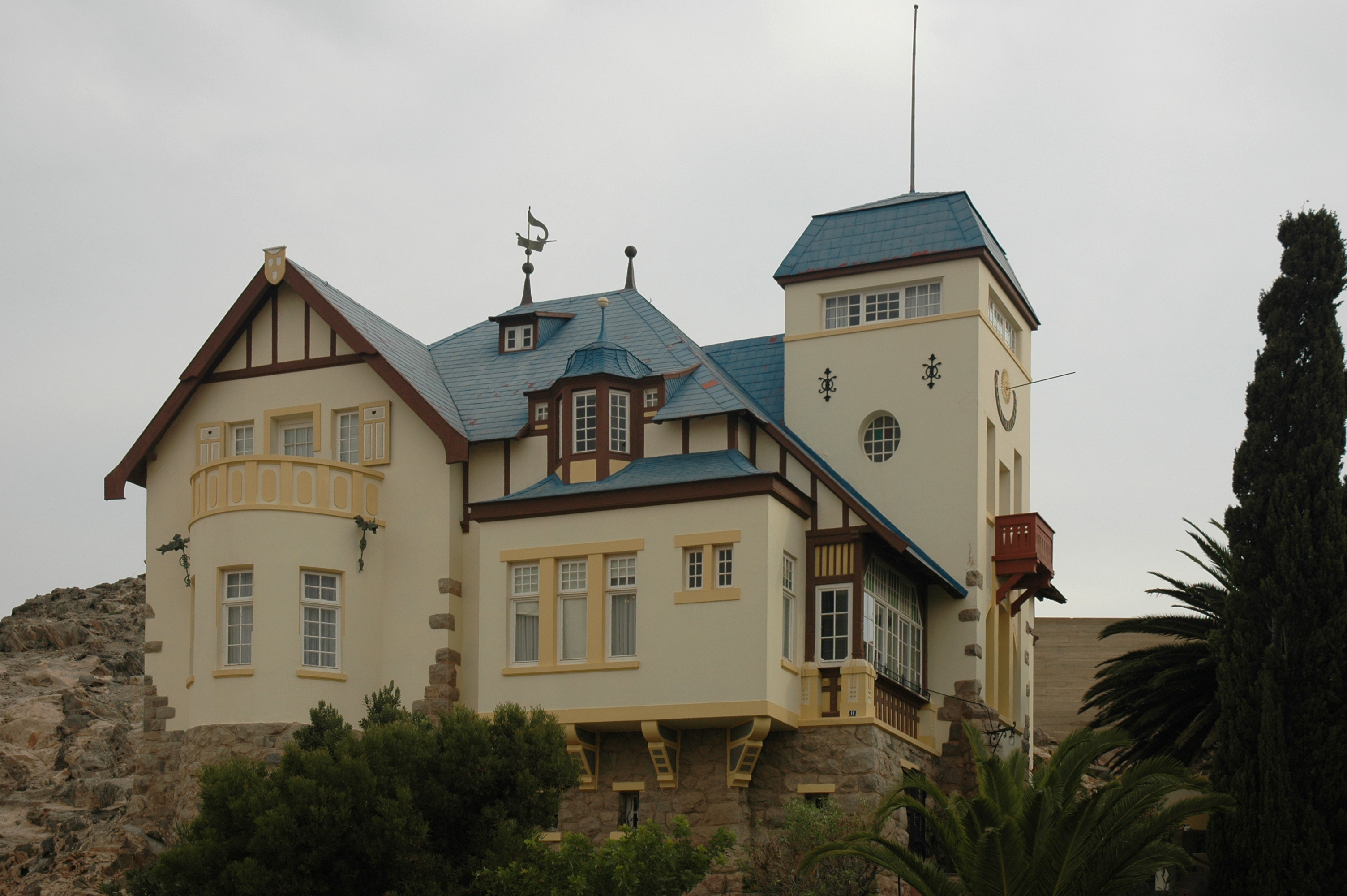 Goerke-Haus, Luderitz, Namibia Photographie prise par GIRAUD Patrick